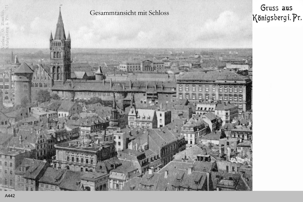 Das Königsberger Schloss vom Süden gesehen